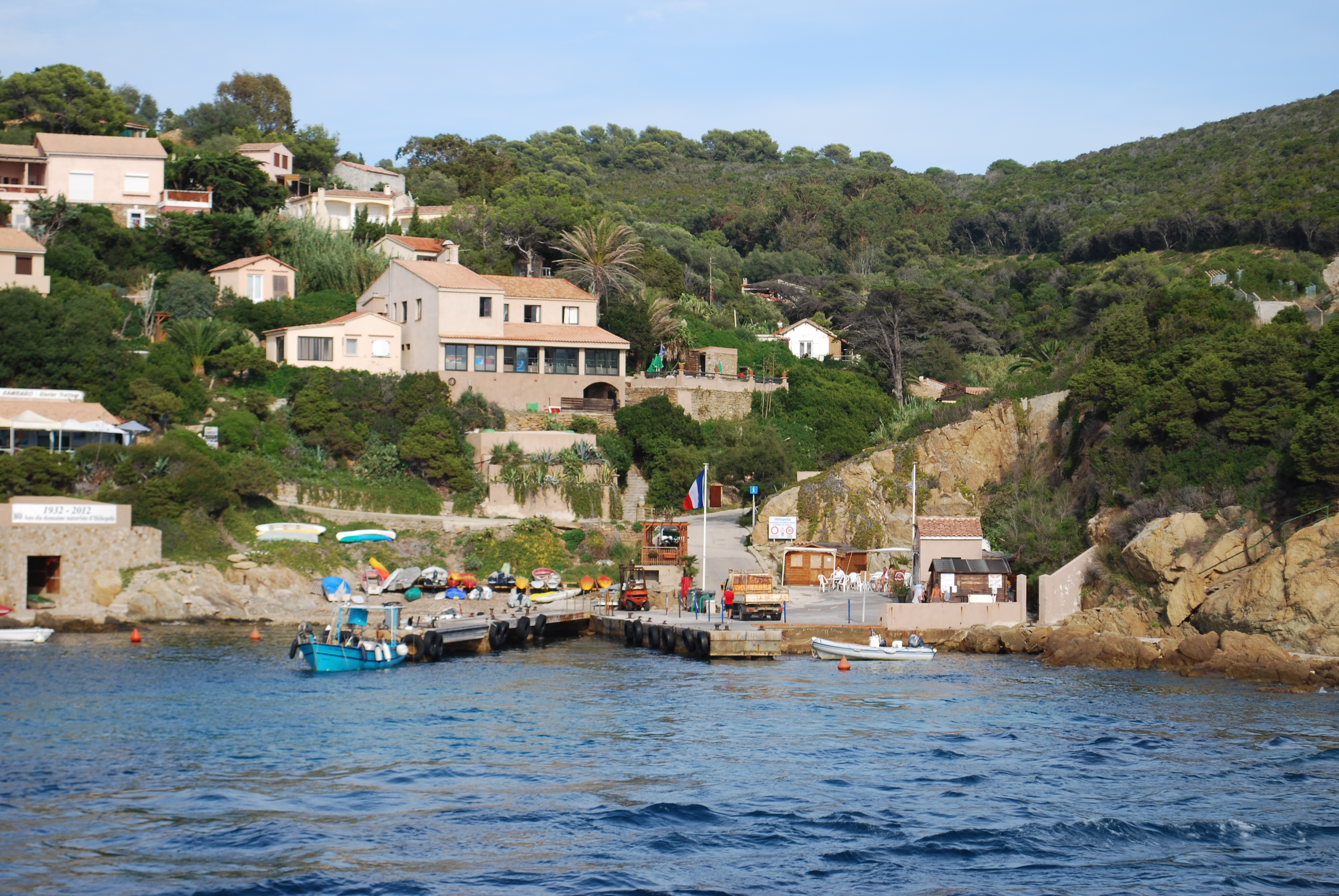 L'arrivée en bateau sur le petit Port de l'île du Levant